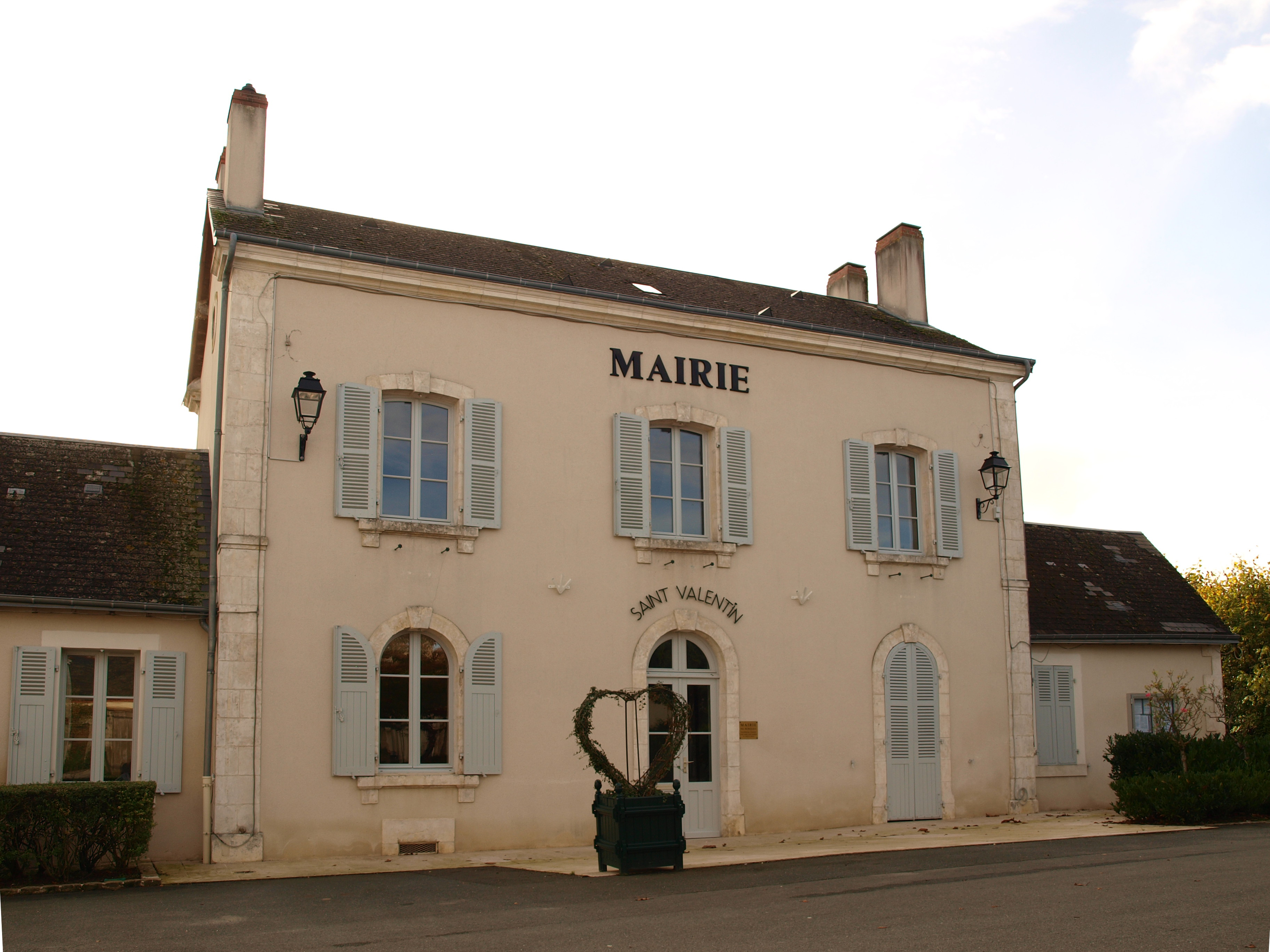 Saint-Valentin (Indre, France) ; mairie